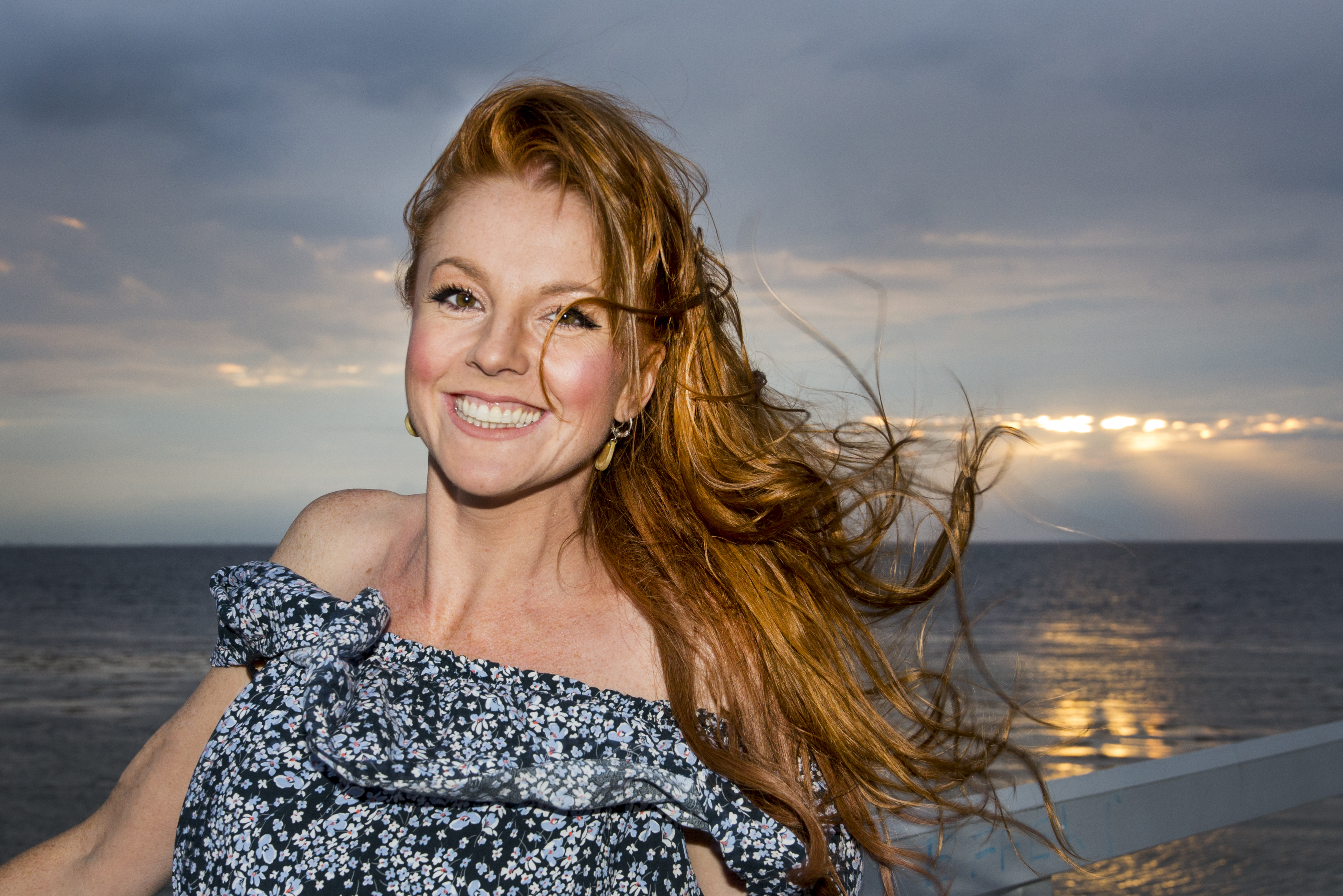 Jannike Stenlund är en Svensk etno artist från Lycksele